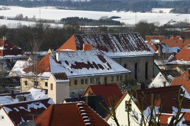 Franzikanerkloster Ellingen